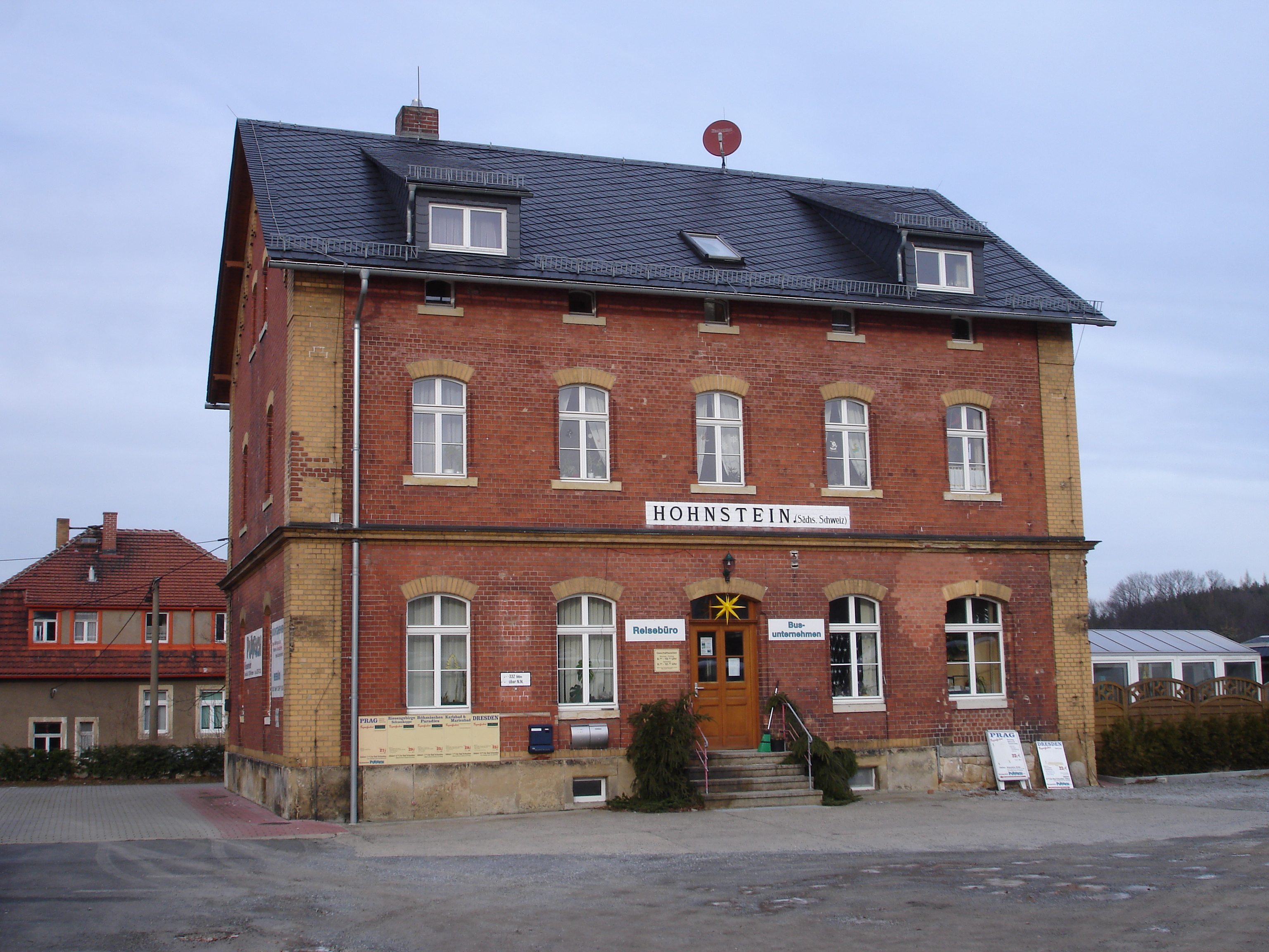 Bahnhof Hohnstein der ehemaligen Schwarzbachbahn